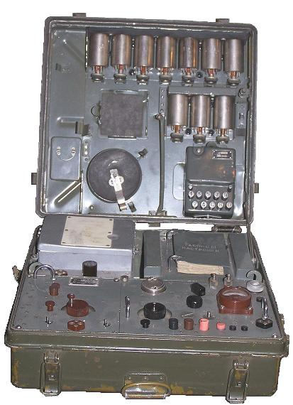 Radiostacja krótkofalowa R-350M. Zdjęcie pochodzi ze strony